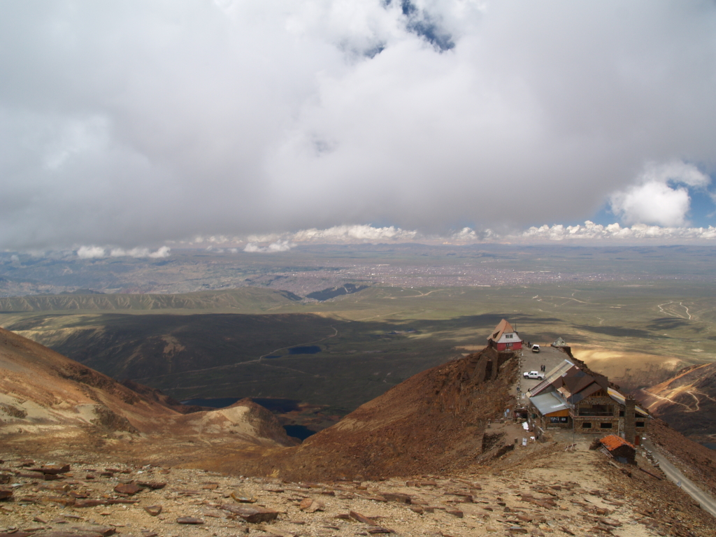 Il Rifugio del Club Andino Boliviano, visto dalla cime di Chacaltaya, La Paz, Bolivia